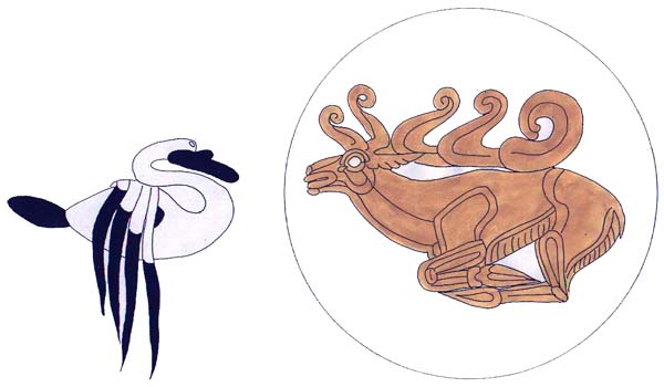 Két szkíta régészeti emlék rajza: paziriki hattyú és aranyszarvas